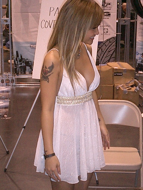 Tila Nguyen